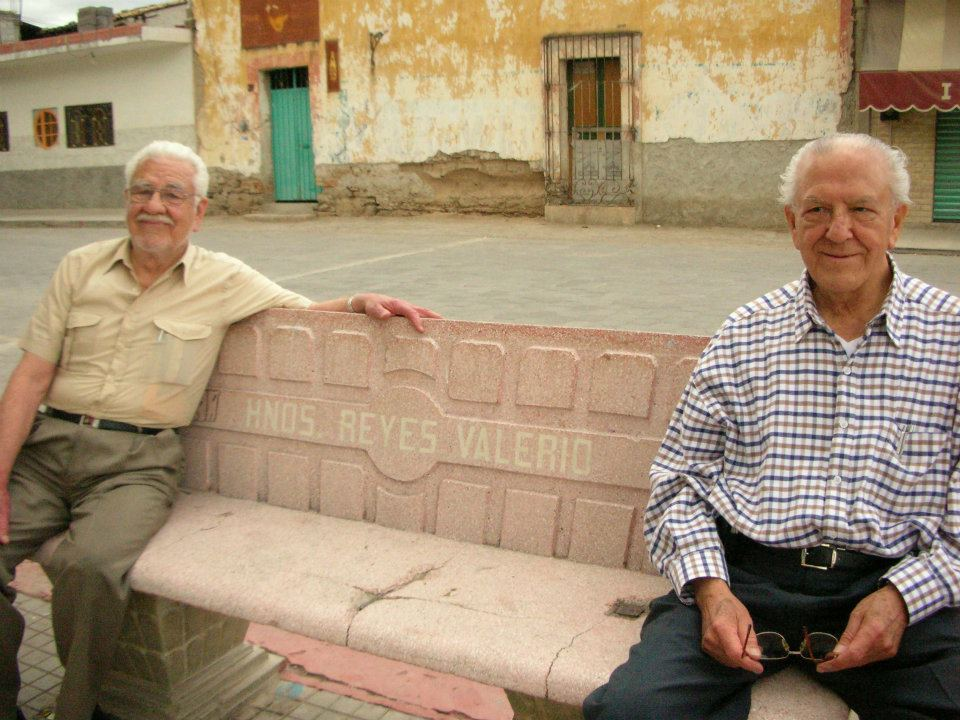 Los hermanos Constantino y Raul Reyes Valerio en Zinacatepec, Puebla